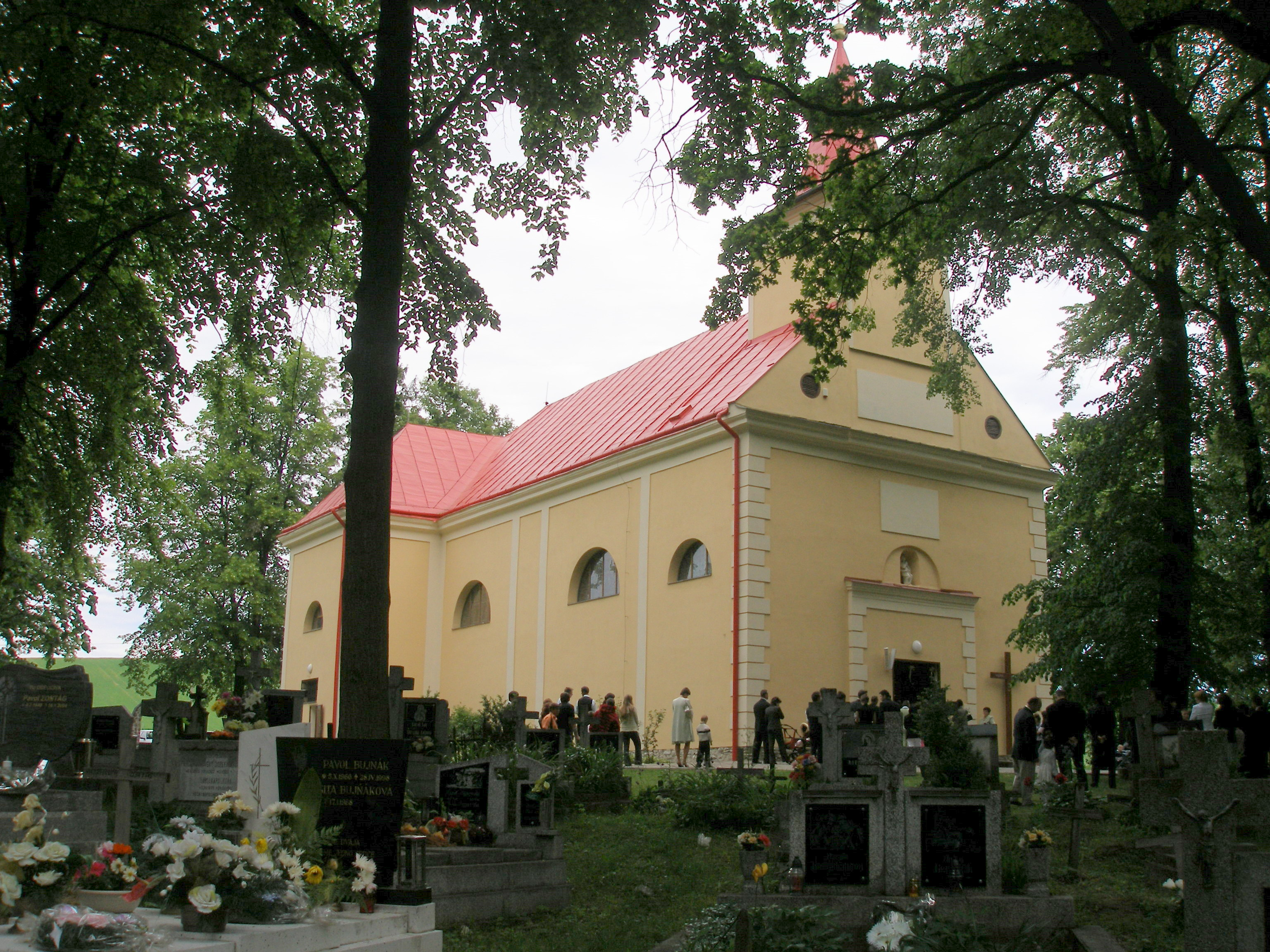 Obec Torysa okres Sabinov